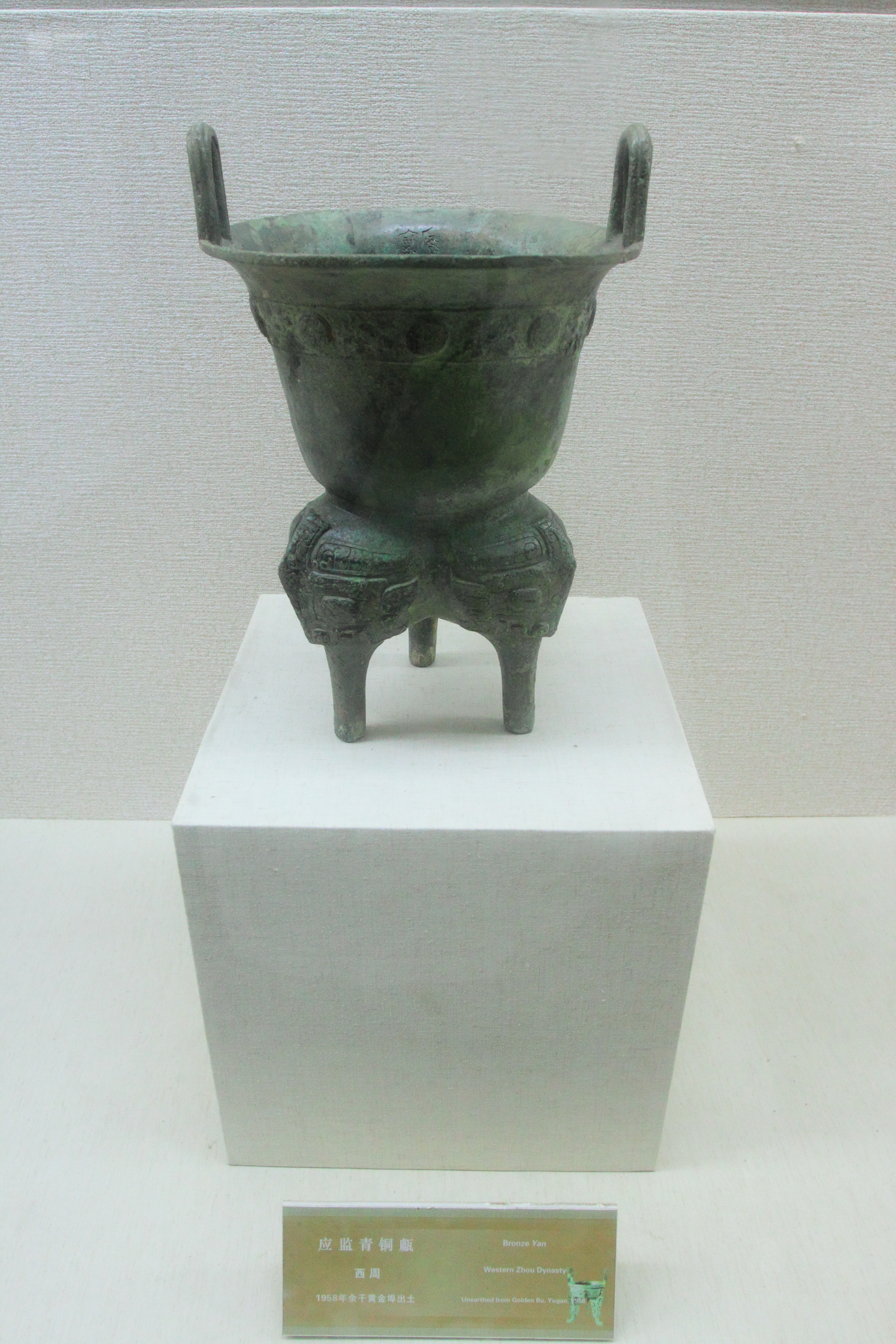 江西省博物馆（位于中国江西省南昌市）藏品——应监青铜甗，西周，1958年余干黄金埠出土。